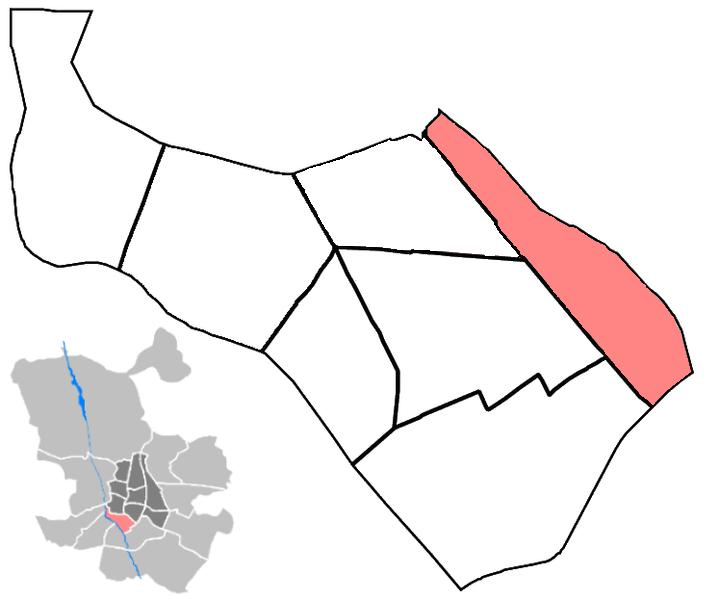 Mapa del barrio de Atocha